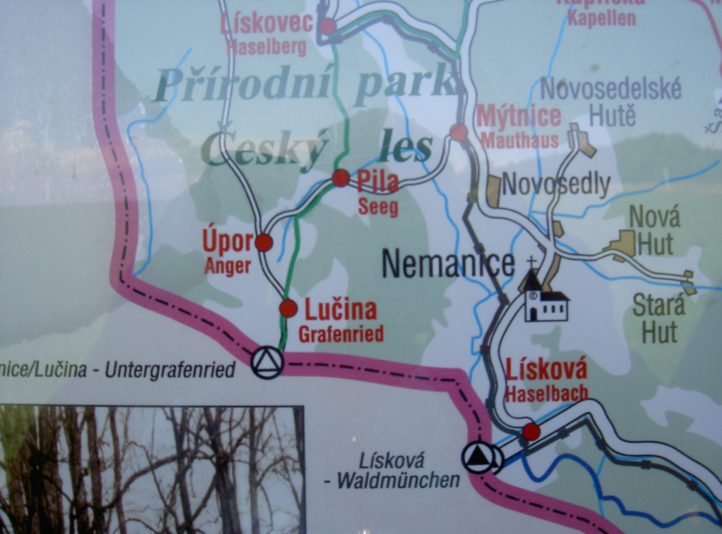 Grafenried (Lučina)